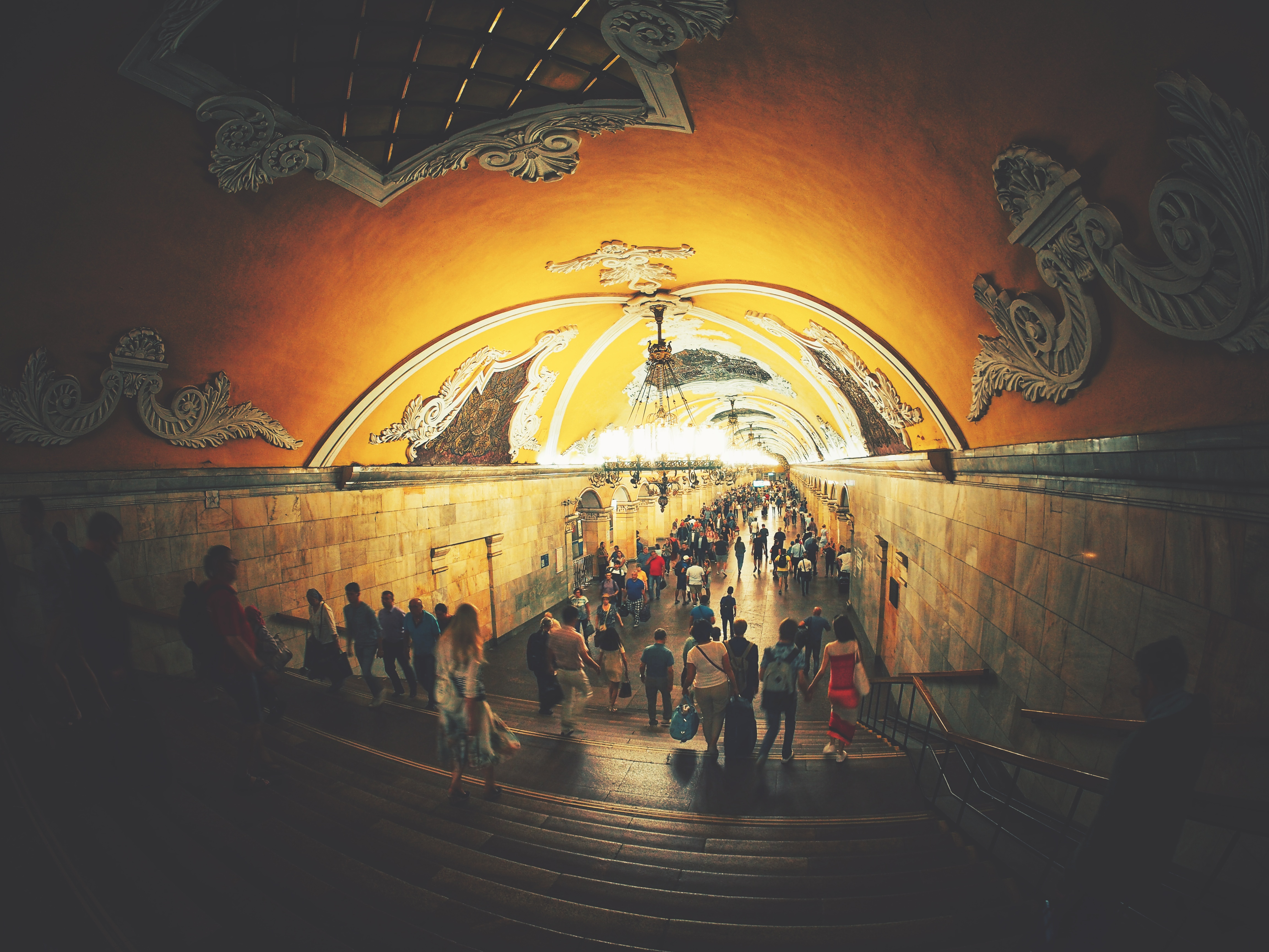 Станция Московского метрополитена Кольцевой линии Комсомольская: Комсомольская пл., дом 3, Красносельский, Центральный округ, Москва